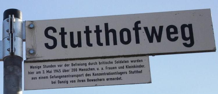 Ehrenfriedhof Cap Arcona - Stutthofweg